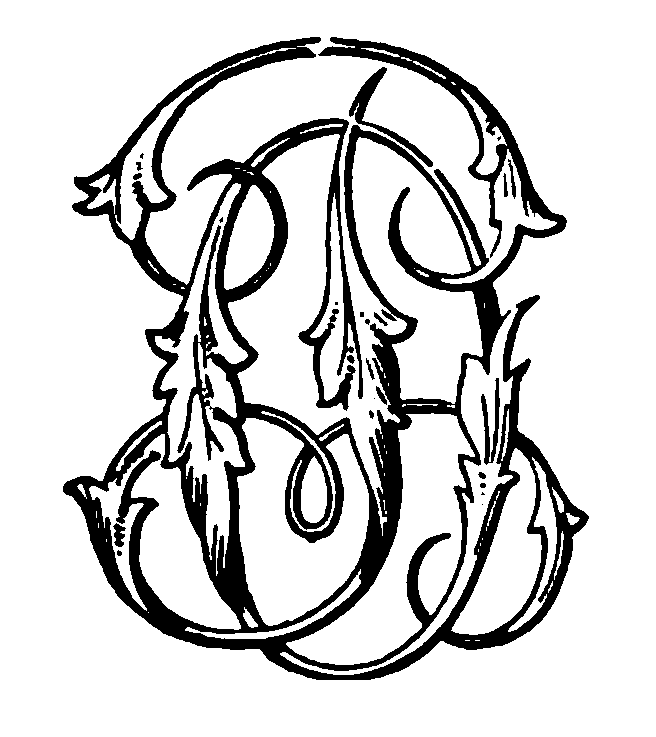 illustration for L’Âme de Pierre